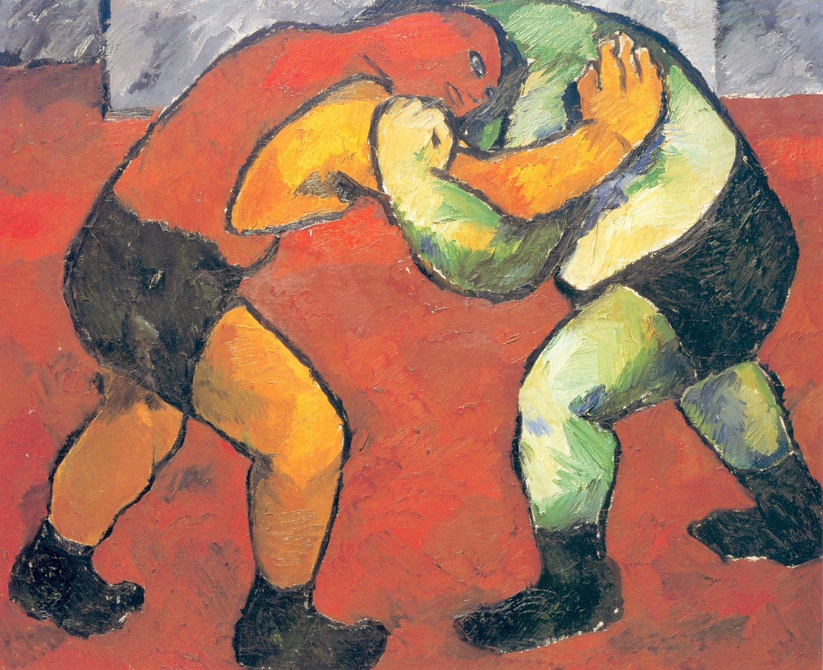 Н. С. Гончарова. Борцы. 1908-1909. ГРМ.